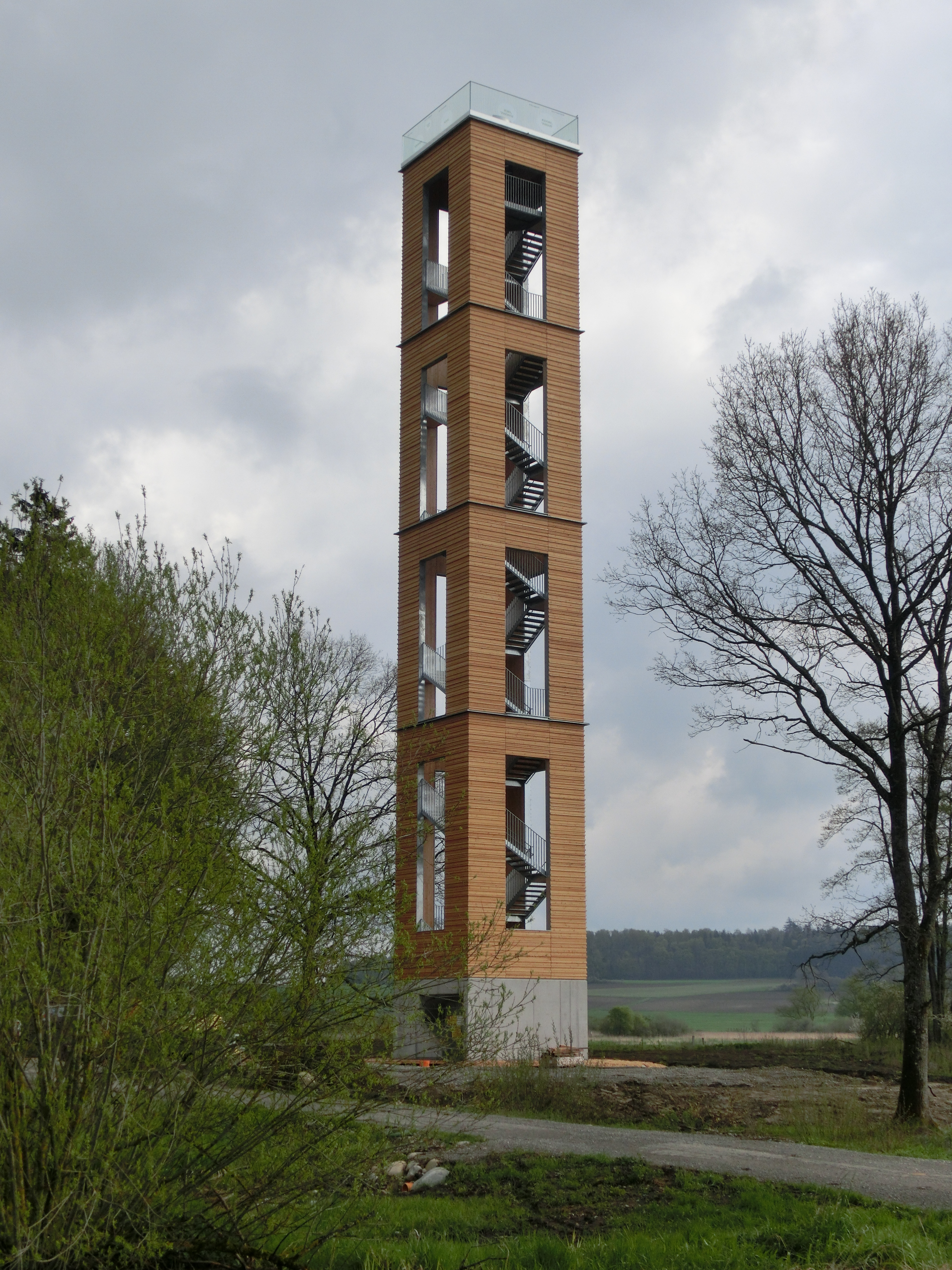 Deutschland (D) - Baden-Württemberg (BW) - Landkreis Sigmaringen (SIG) - Ostrach: "Bannwaldturm" im Pfrunger-Burgweiler Ried